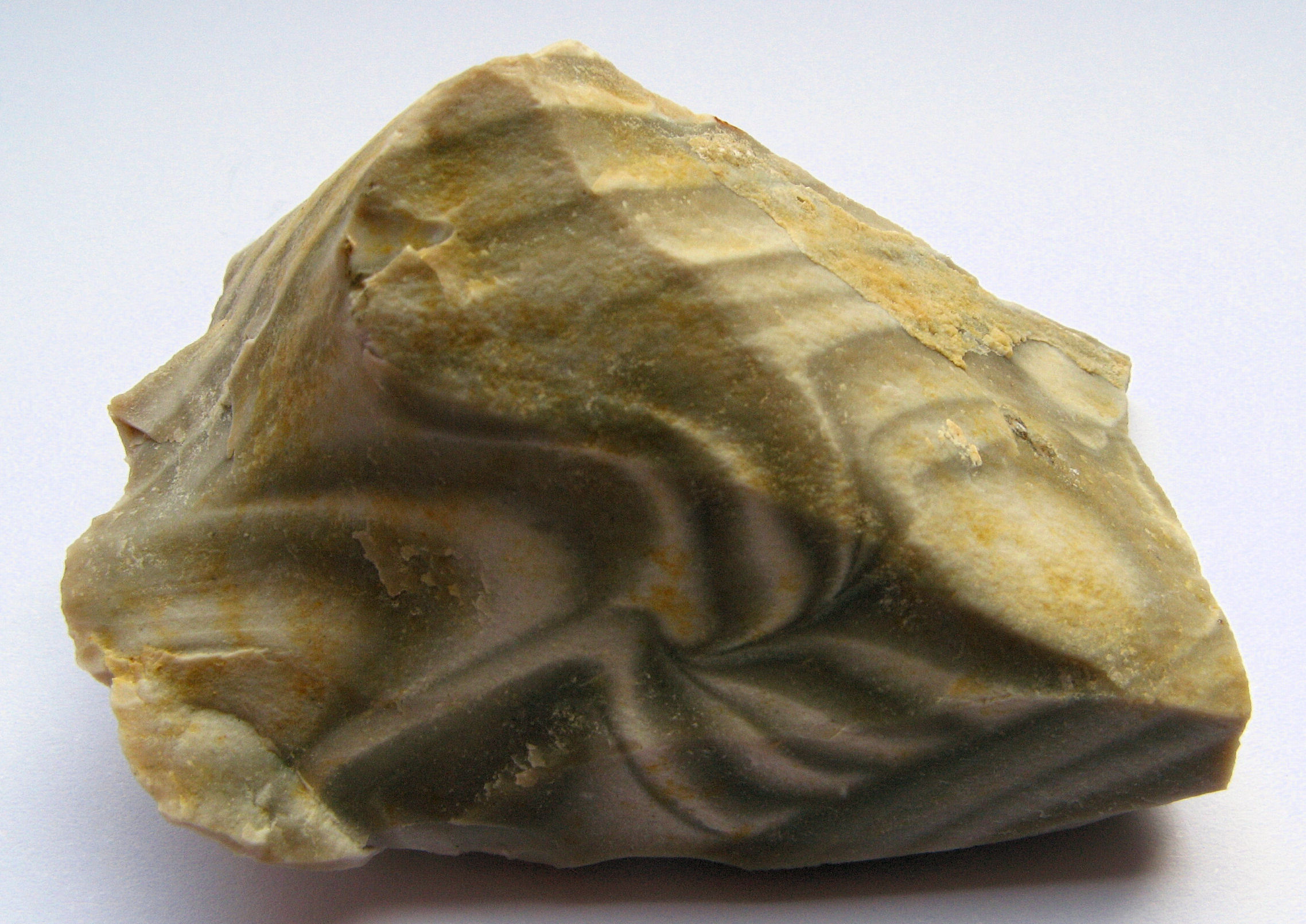 Feuerstein (Flint) aus Polen, Unterseite